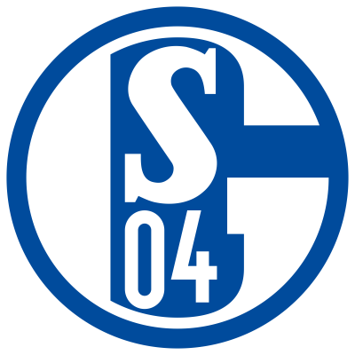 Schalke 04 logo